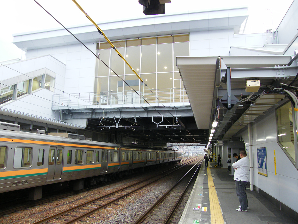 ホーム（1番線より）